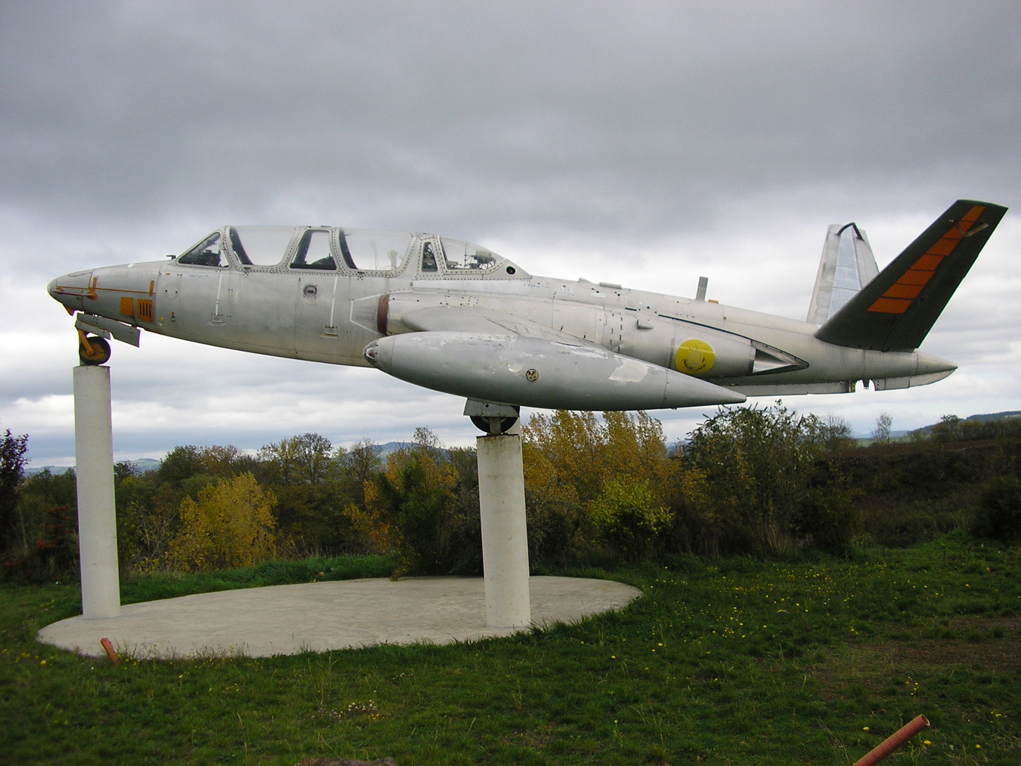 Avion de Loudes Photographie personnelle de l'utilisateur LeVellave.